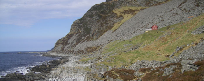 Det fråflytta bruket Aardalen i Selje kommune